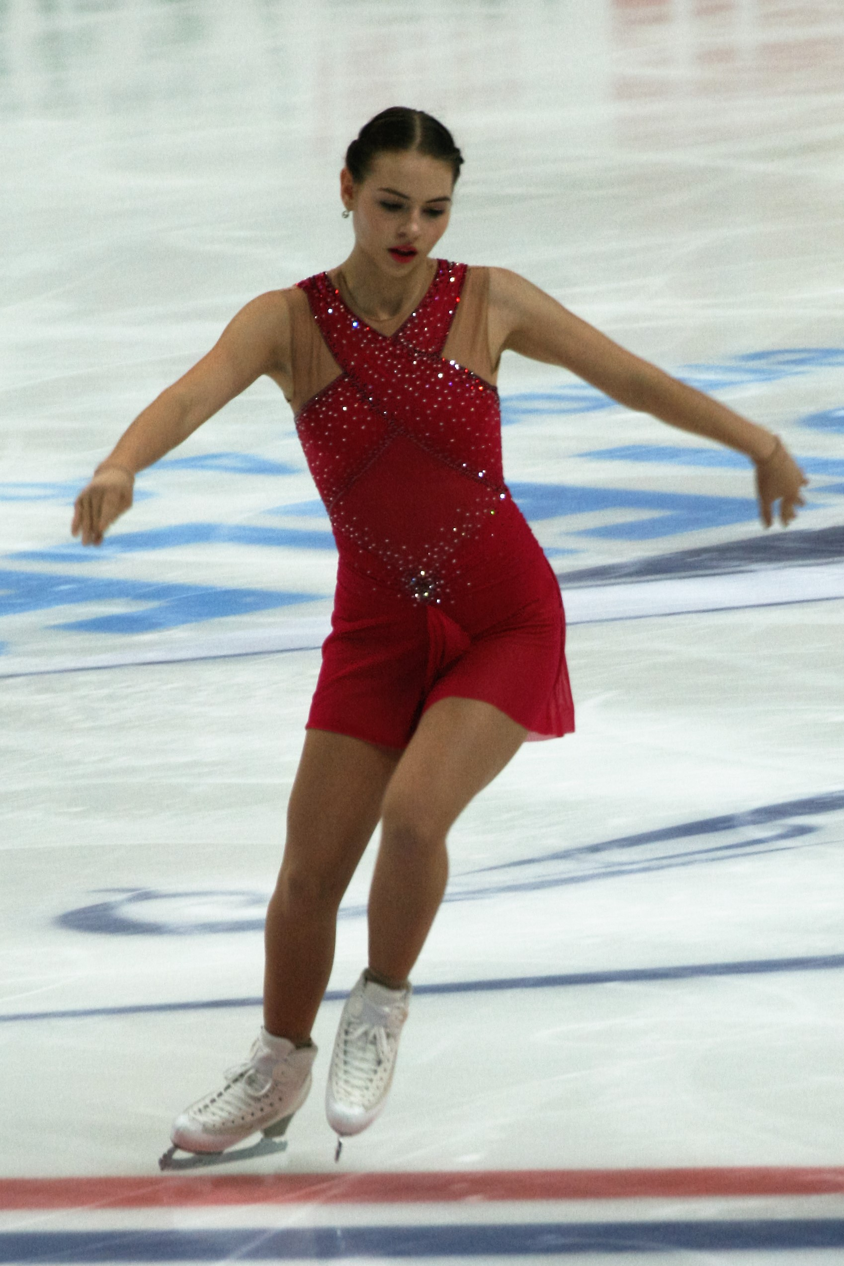 Ангелина Кучвальская (Латвия) на Кубке Ростелекома 2016.